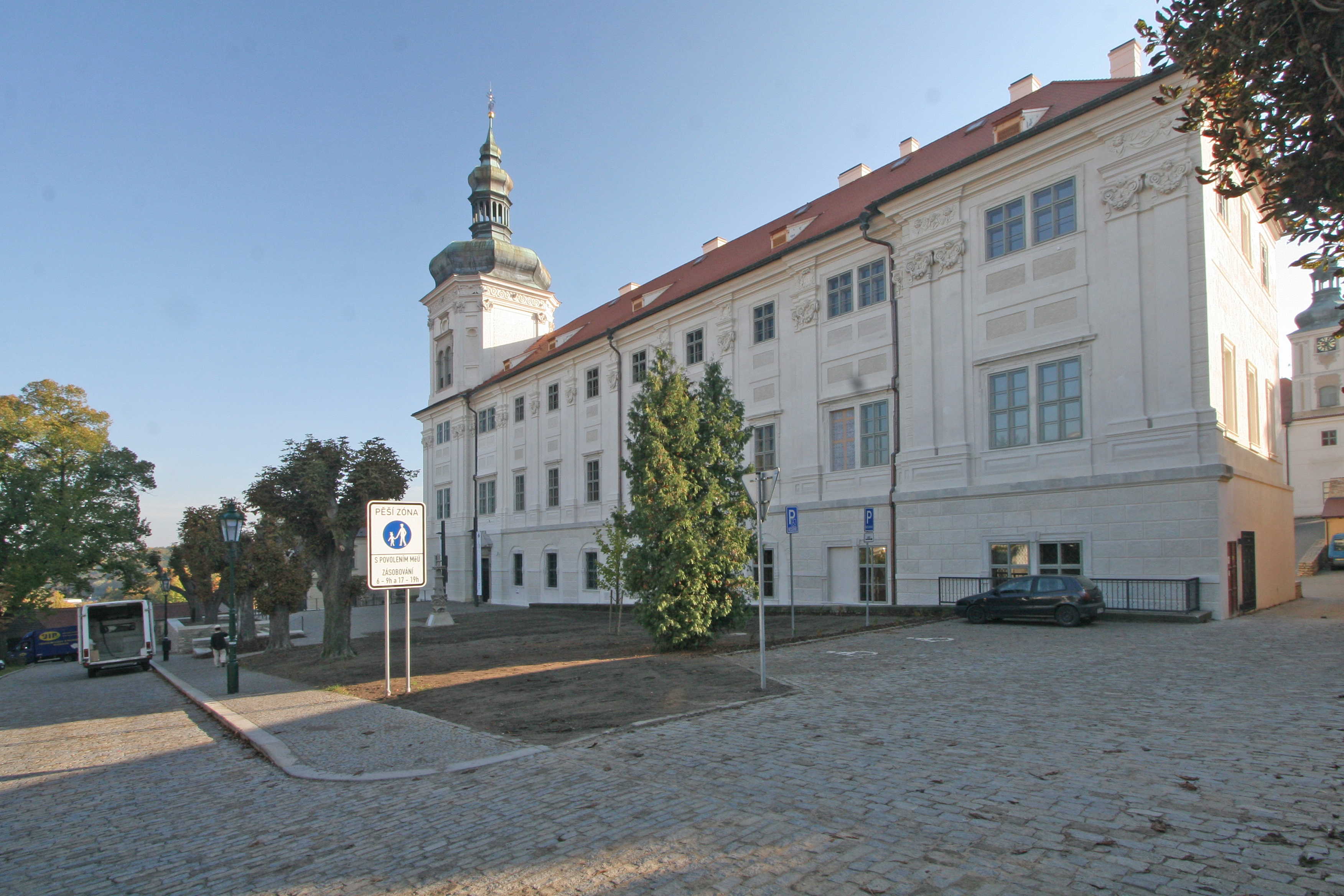 Kolej jezuitská (Kutná Hora), Barborská, čp. 51, 52, 53 a 54 51/24, Kutná Hora